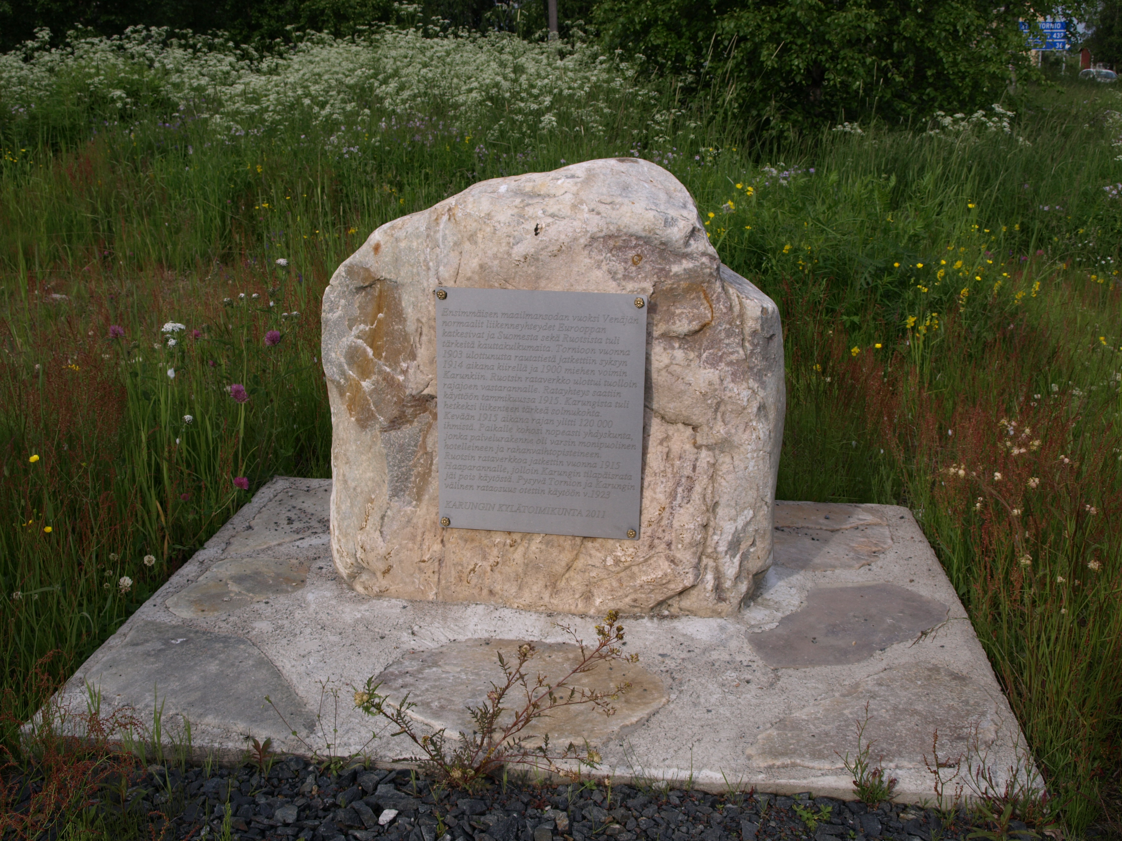 Tornio - Karunki radan mmerkki